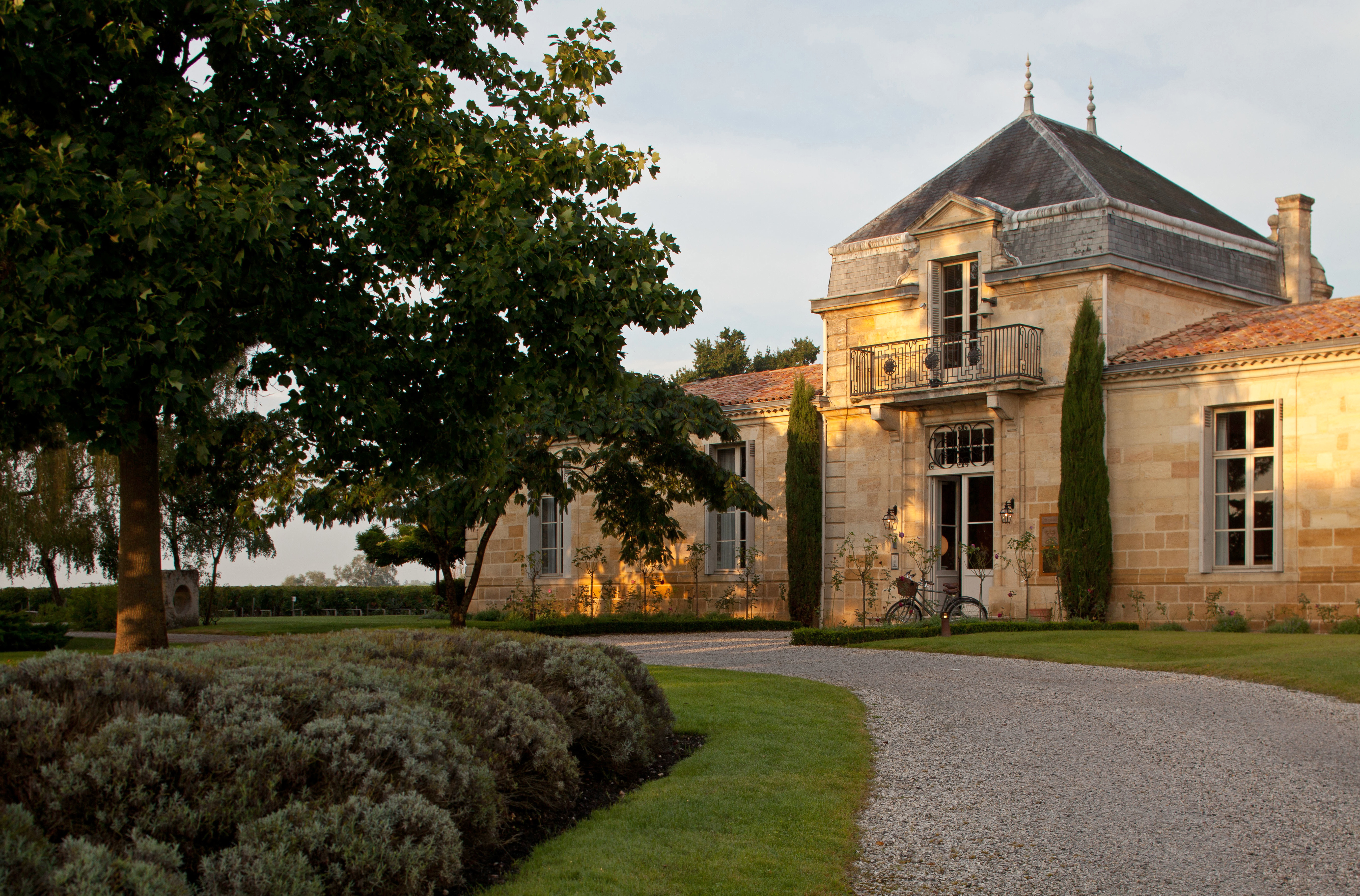 Façade de la chartreuse du Château Cordeillan-Bages